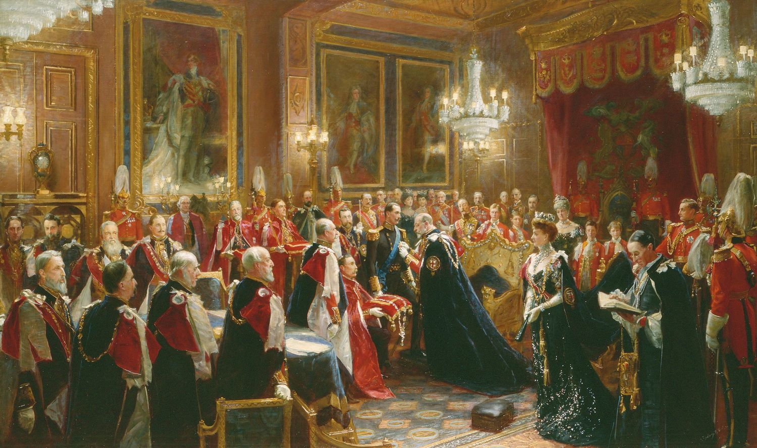 Titel: "The investiture of Haakon VII of Norway with the Order of the Garter in the Throne Room, Windsor Castle, November 1906"[1] Haakon de Zevende van Noorwegen wordt opgenomen in de Orde van de Kousenband (1910) De Schilder, Sydney Prior Hall stierf in 1922.